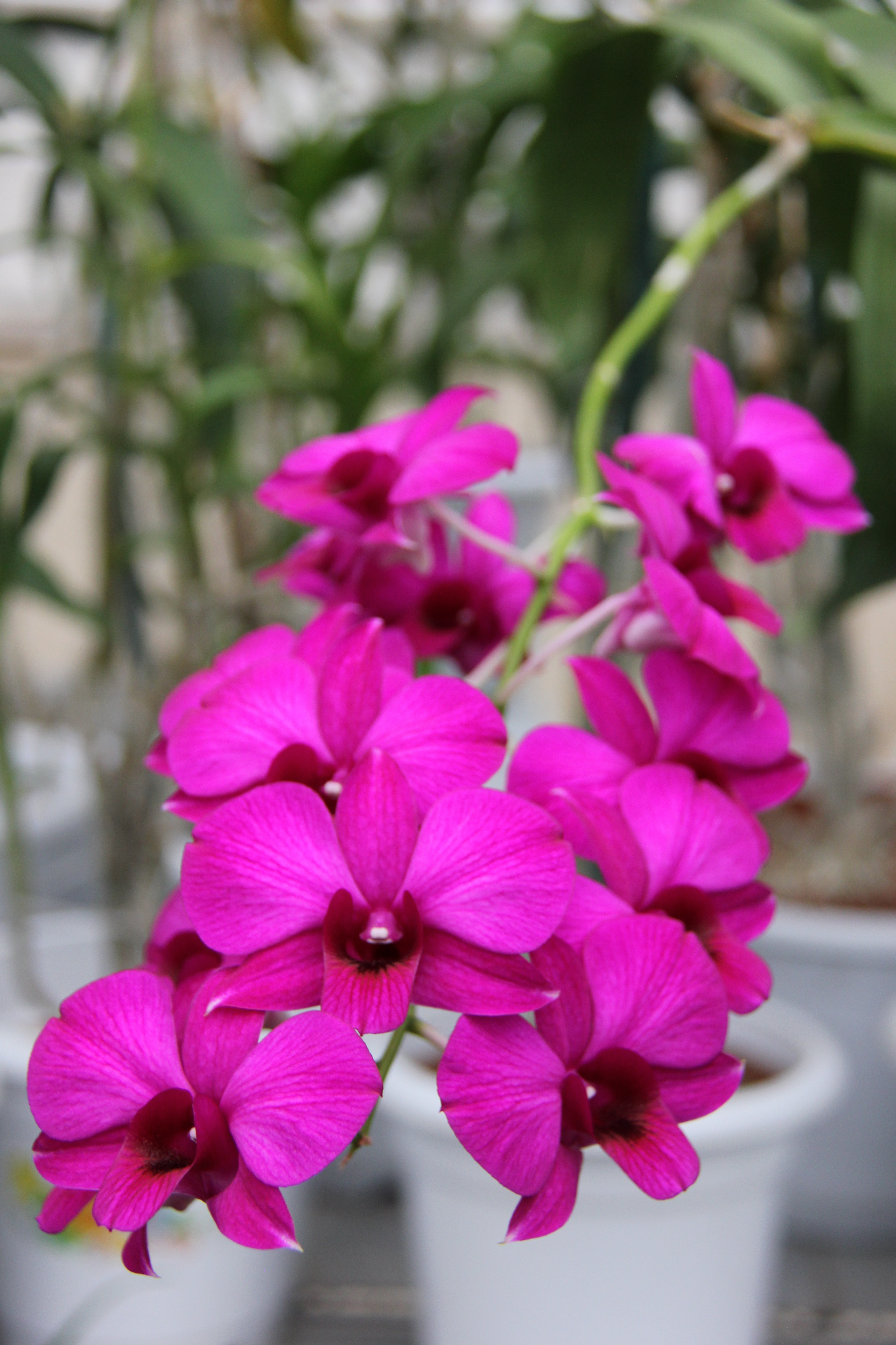 Kimilsungia